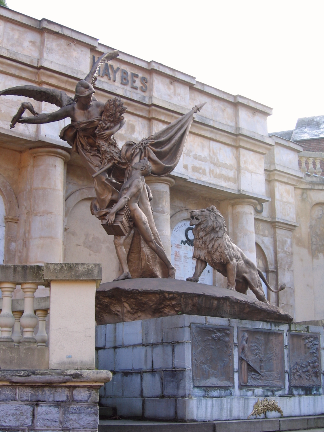 Vue de détail du Monument.